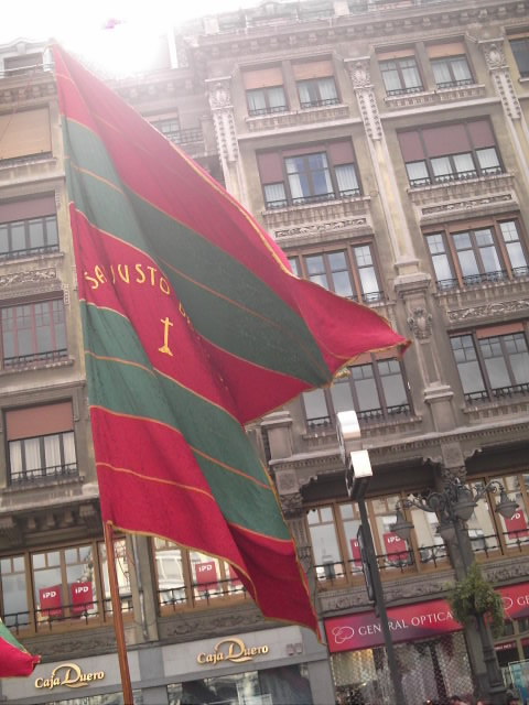 Pendones de León. Fiesta de San Froilán del 2006.